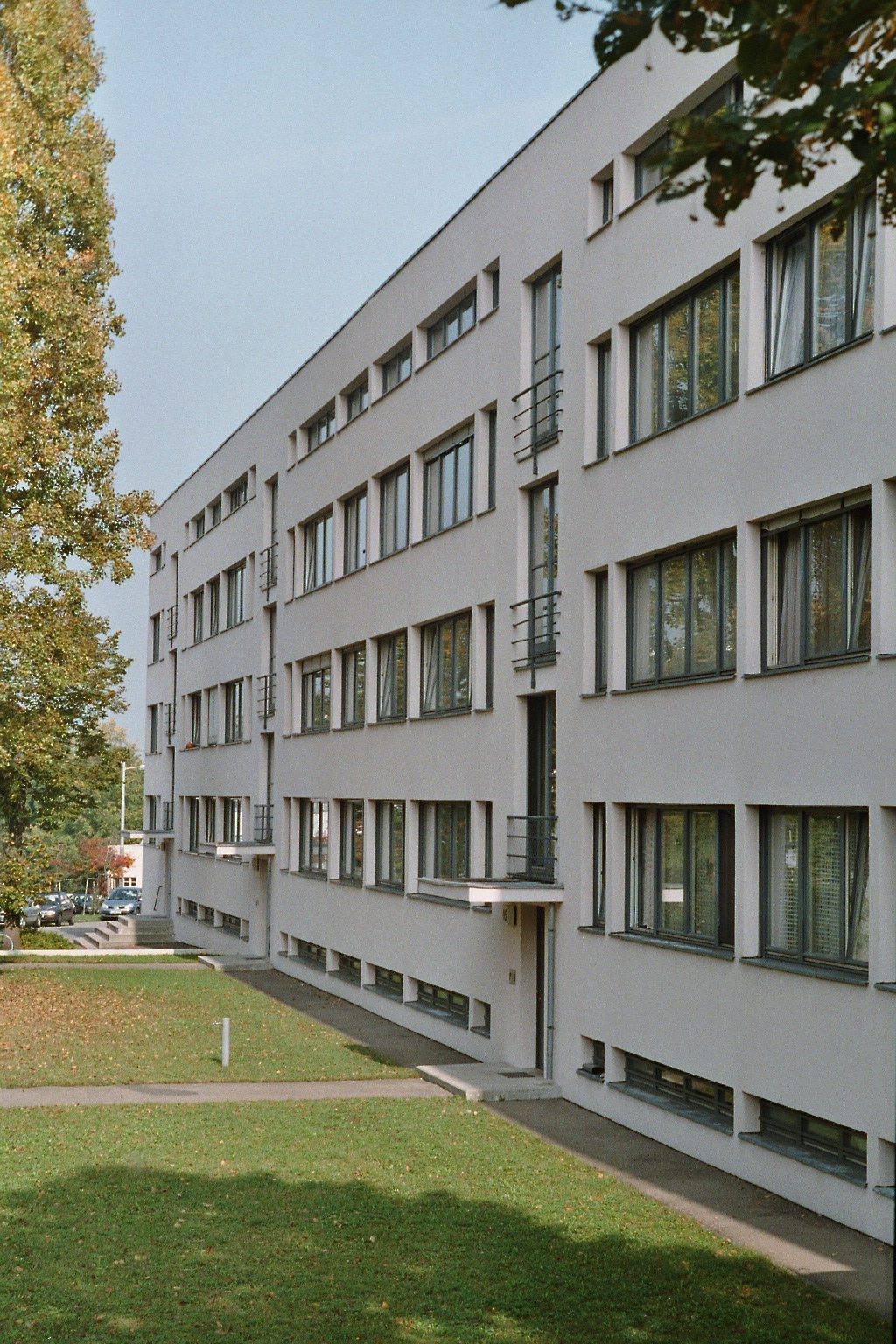 Stuttgart, Weissenhofsiedlung, Apartment house by Ludwig Mies van der Rohe. 1927, international style.